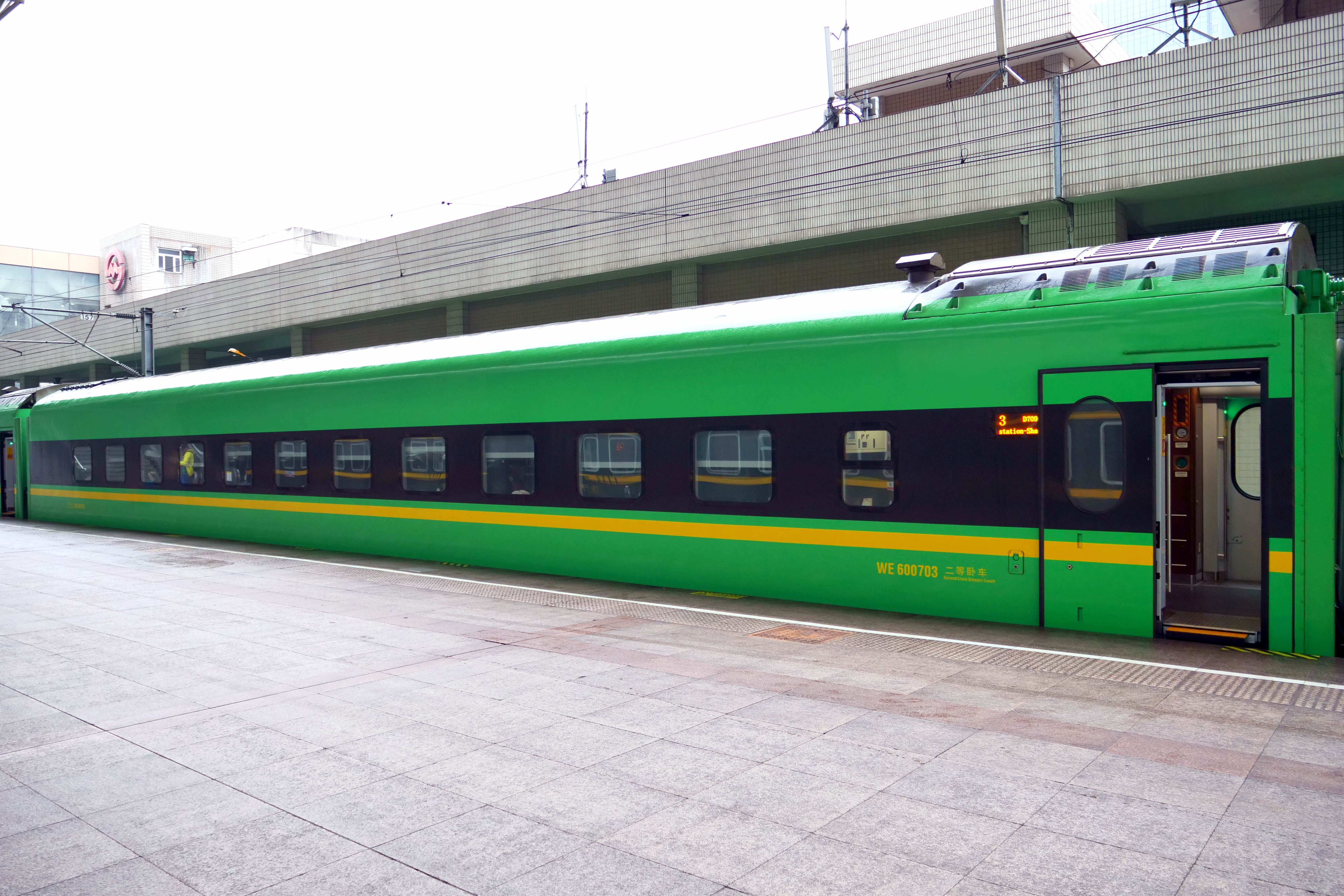 CR200J